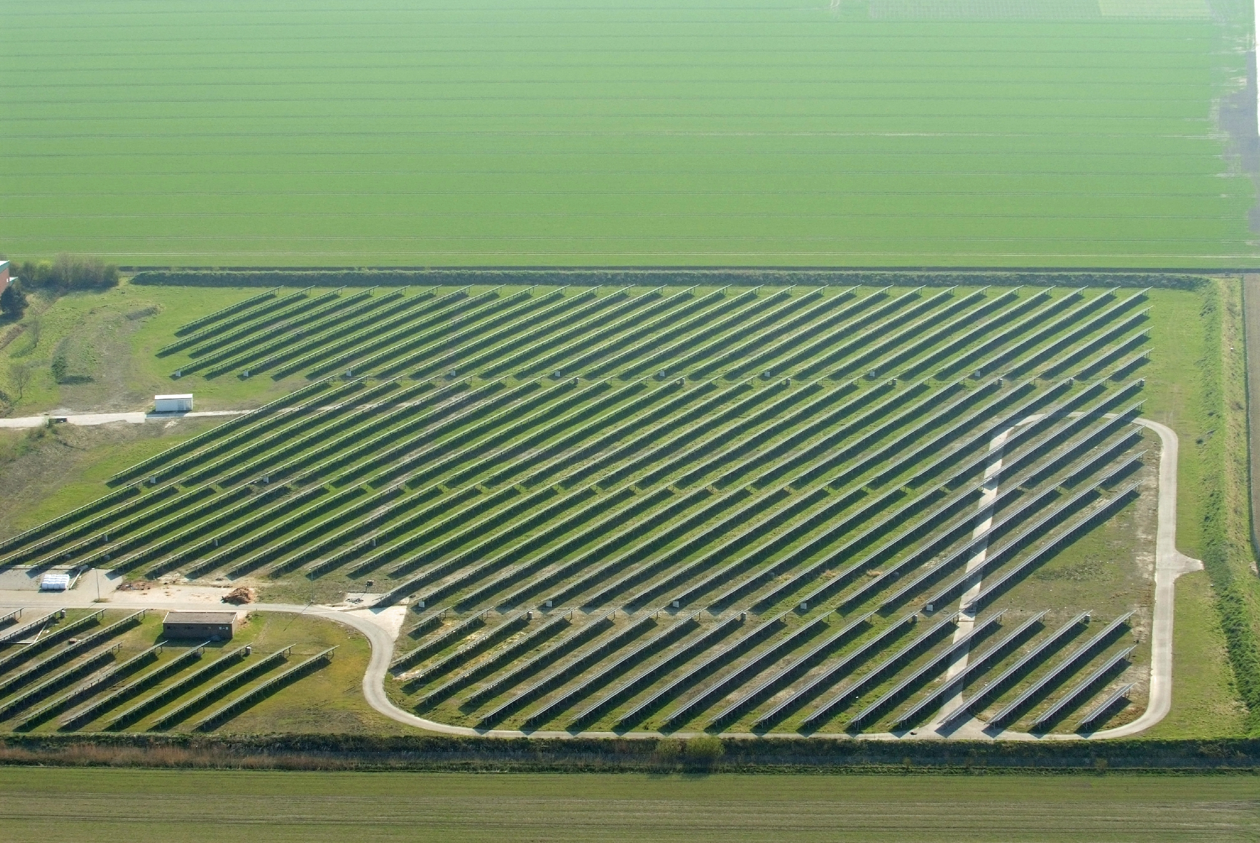 Solaranlage bei Friederikensiel / Fotoflug von Nordholz-Spieka nach Oldenburg und Papenburg